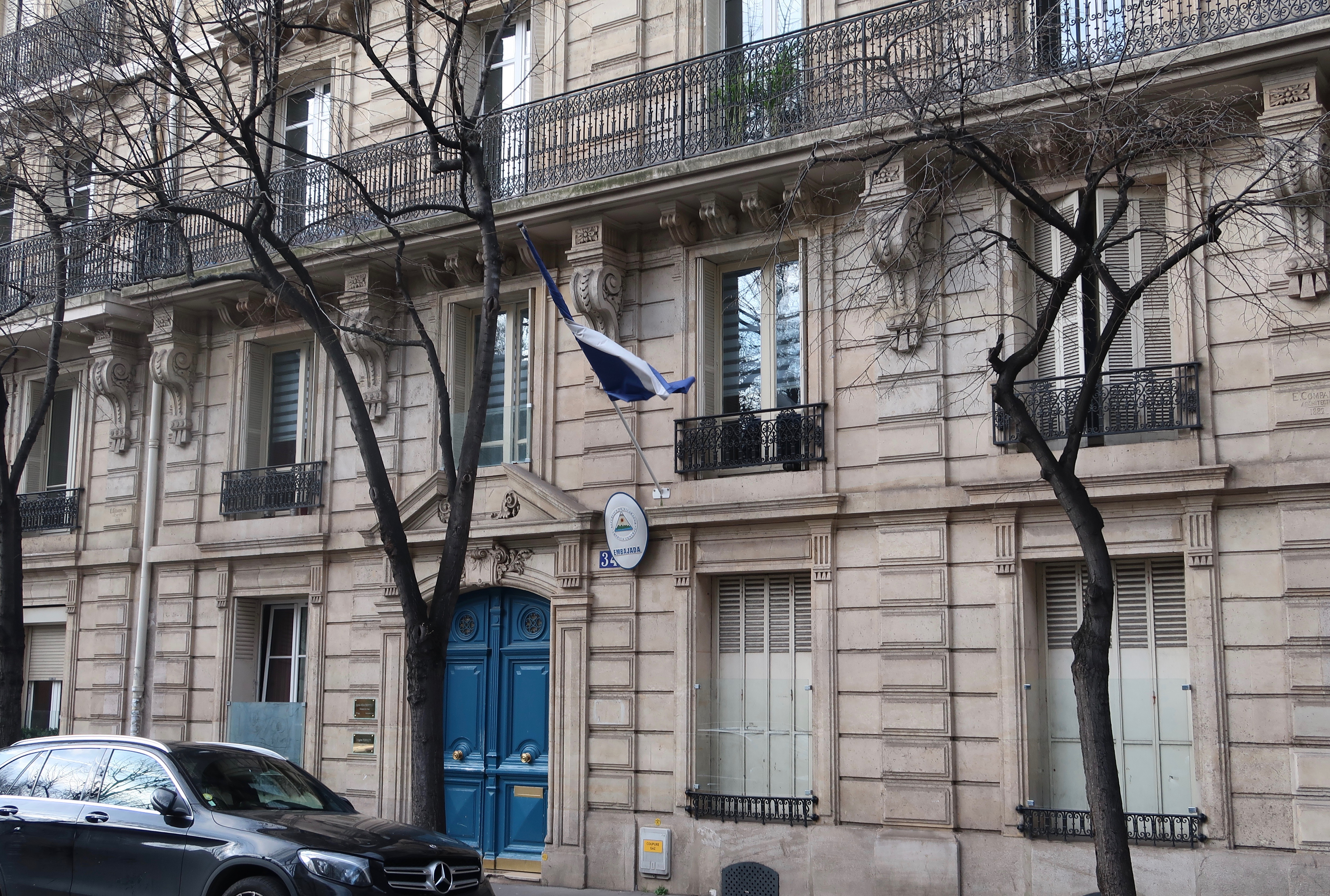 Ambassade du Nicaragua en France, 34 avenue Bugeaud (Paris, 16e).